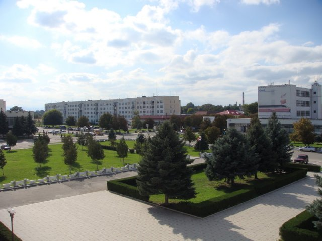 Один из микрорайонов Нарткалы